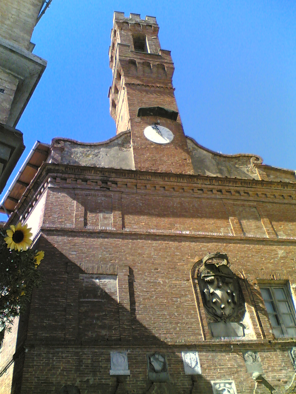 Palazzo Pretorio, Sinalunga (Siena, Italy)